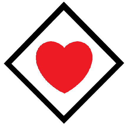 Geschwaderwappen des Jagdgeschwaders 77 der Luftwaffe, Herz-Rot